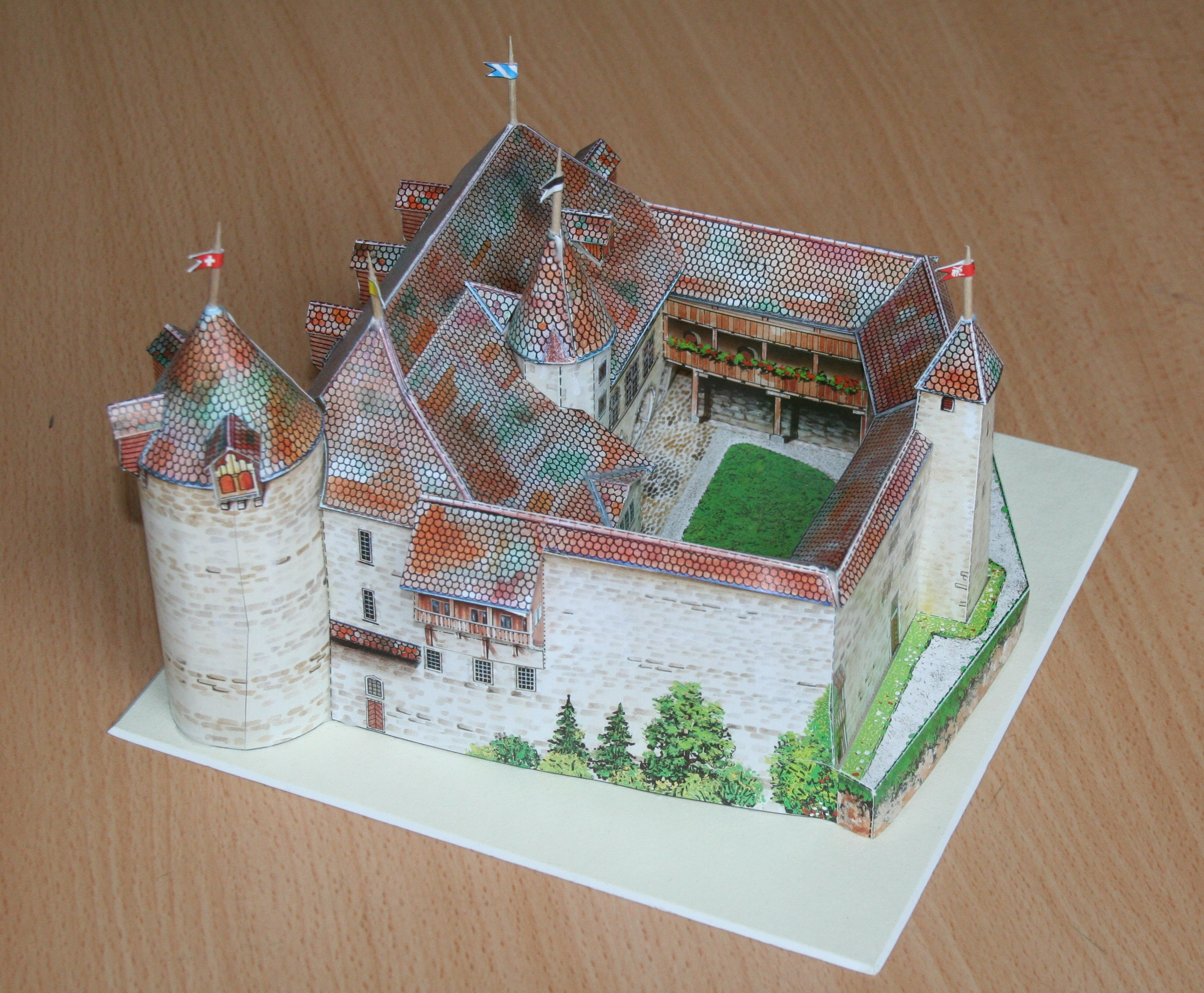 Kartonmodell Schloss Greyerz, zusammengesetzt von Cédric Niggli